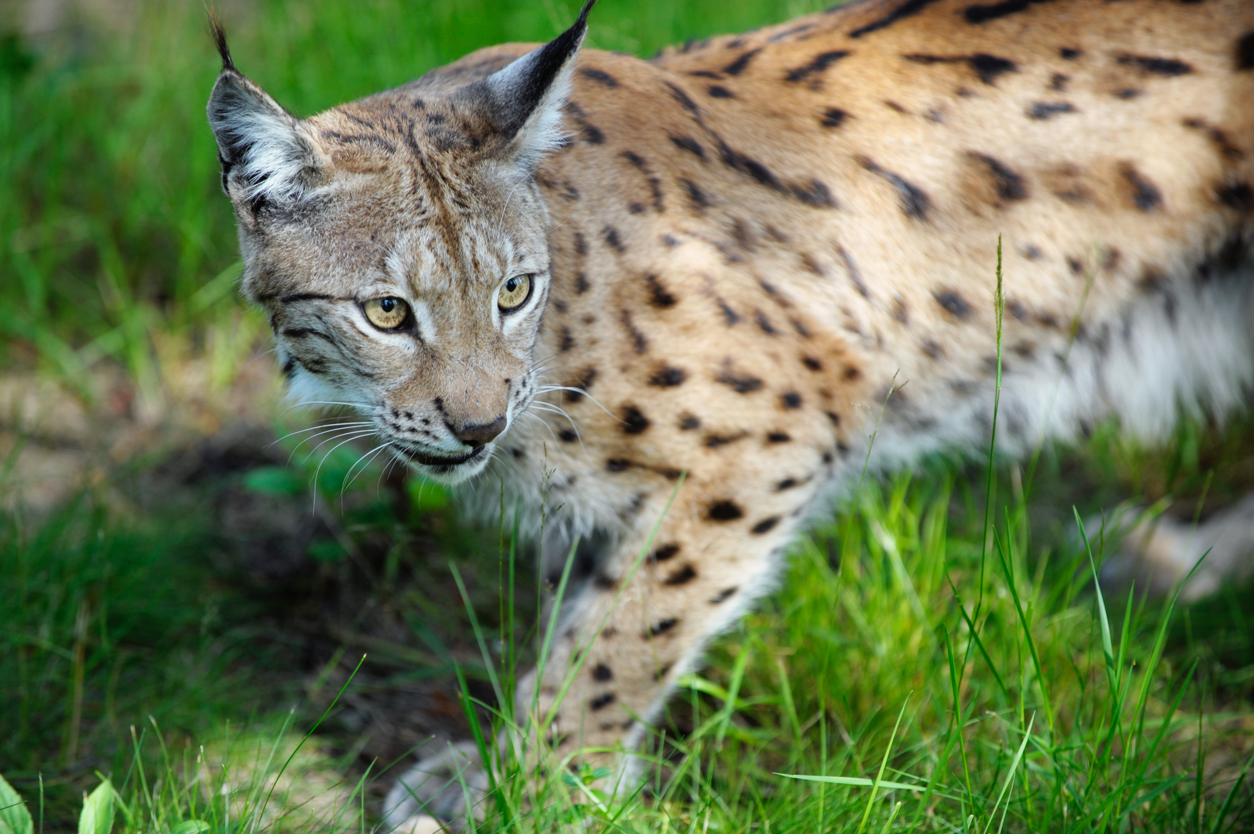 Lodjur fotograferad på Polar Zoo Norge